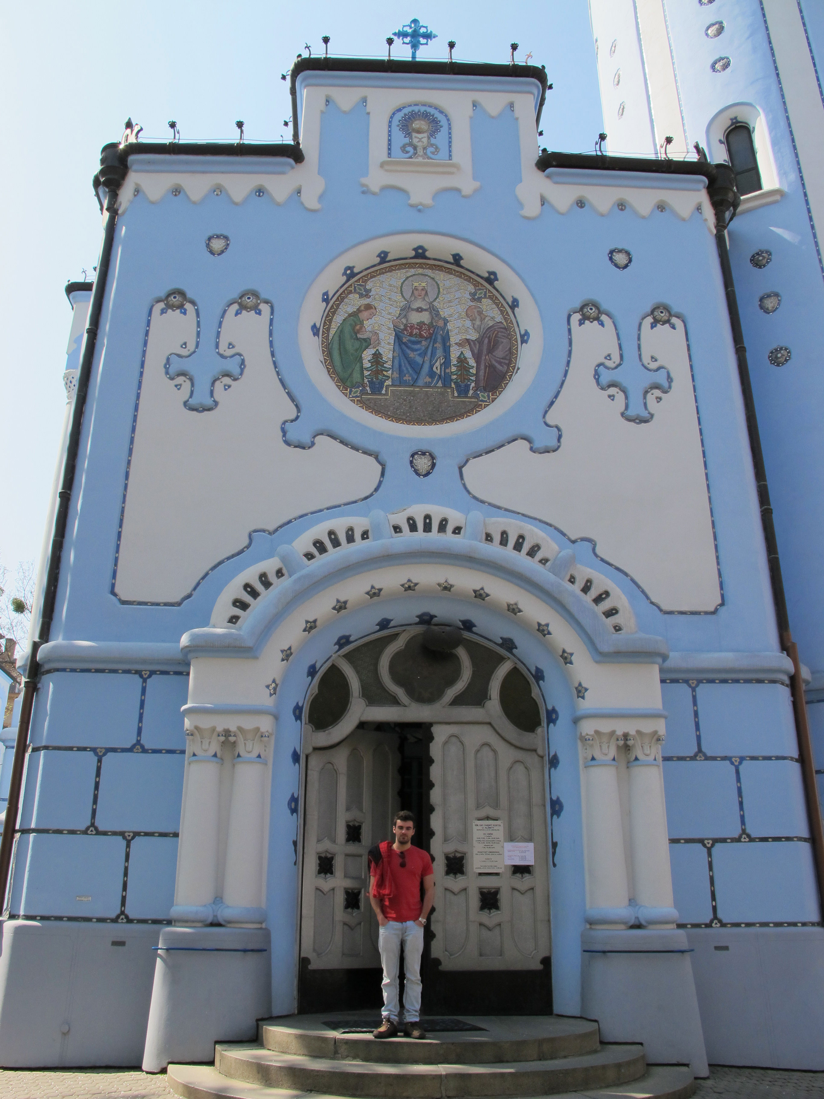 La Iglesia Azul - Bratislava - República Eslovaca Oficialmente conocida como la Iglesia de Santa Isabel de Hungría, pero comúnmente conocida simplemente como "la Iglesia Azul" por razones obvias, esto es lo más atractivo de Bratislava edificio de art nouveau. Su estilo, a veces conocida como la secesión de Hungría, se repite en la escuela primaria cercana en Grosslingova Street. Ambos fueron diseñados por el arquitecto Edmund Lechner Budapest y construido en el siglo XX (la iglesia fue consagrada el 11 de octubre de 1913). Tanto el interior como exterior de la iglesia están pintadas en tonos de azul claro y azul decorada con mayólicas, incluso el techo está decorada con cerámica vidriada azul. La estructura incorpora una torre redonda 36,8 metros. Fuente y más información de Bratislava : visit.bratislava.sk/en/index.asp Blog de Bratislava : .es/ Ver el videofotos de Bratislava aquí : Fotografías